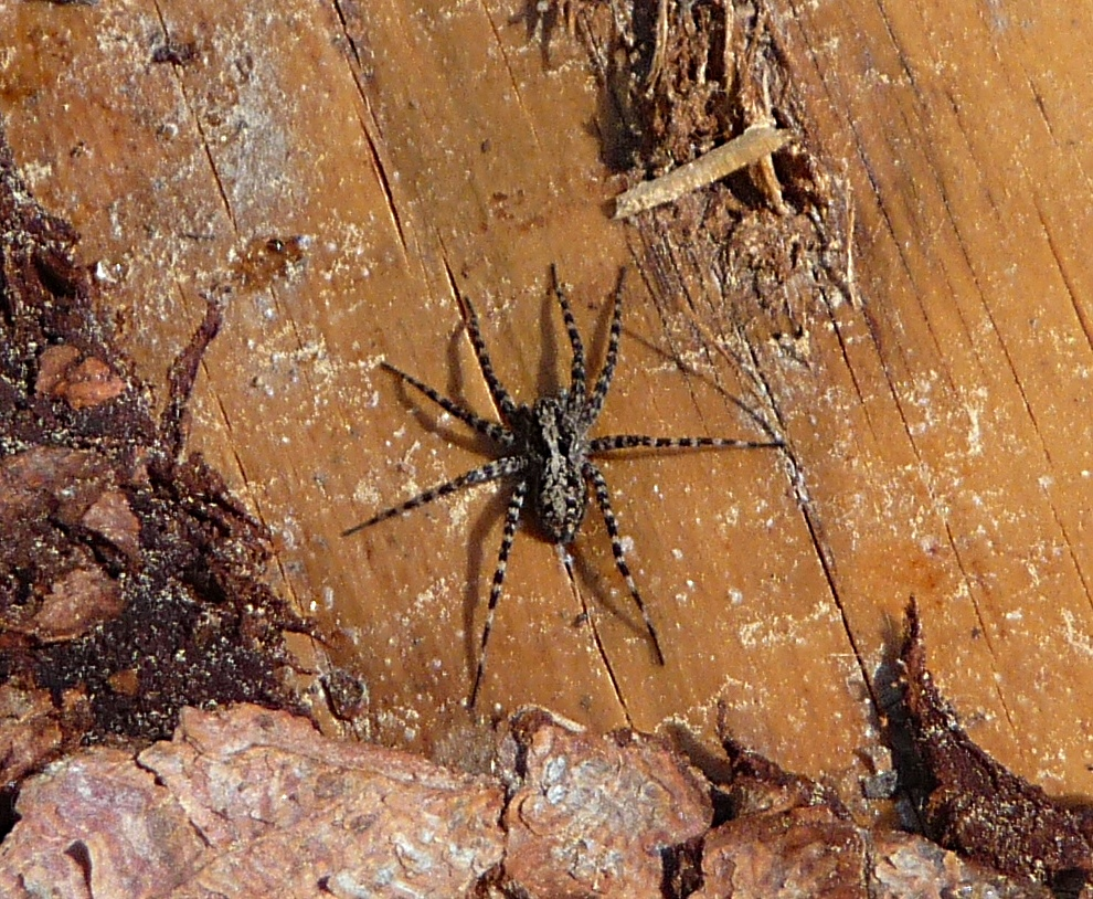 Acantholycosa lignaria bei Frauenau